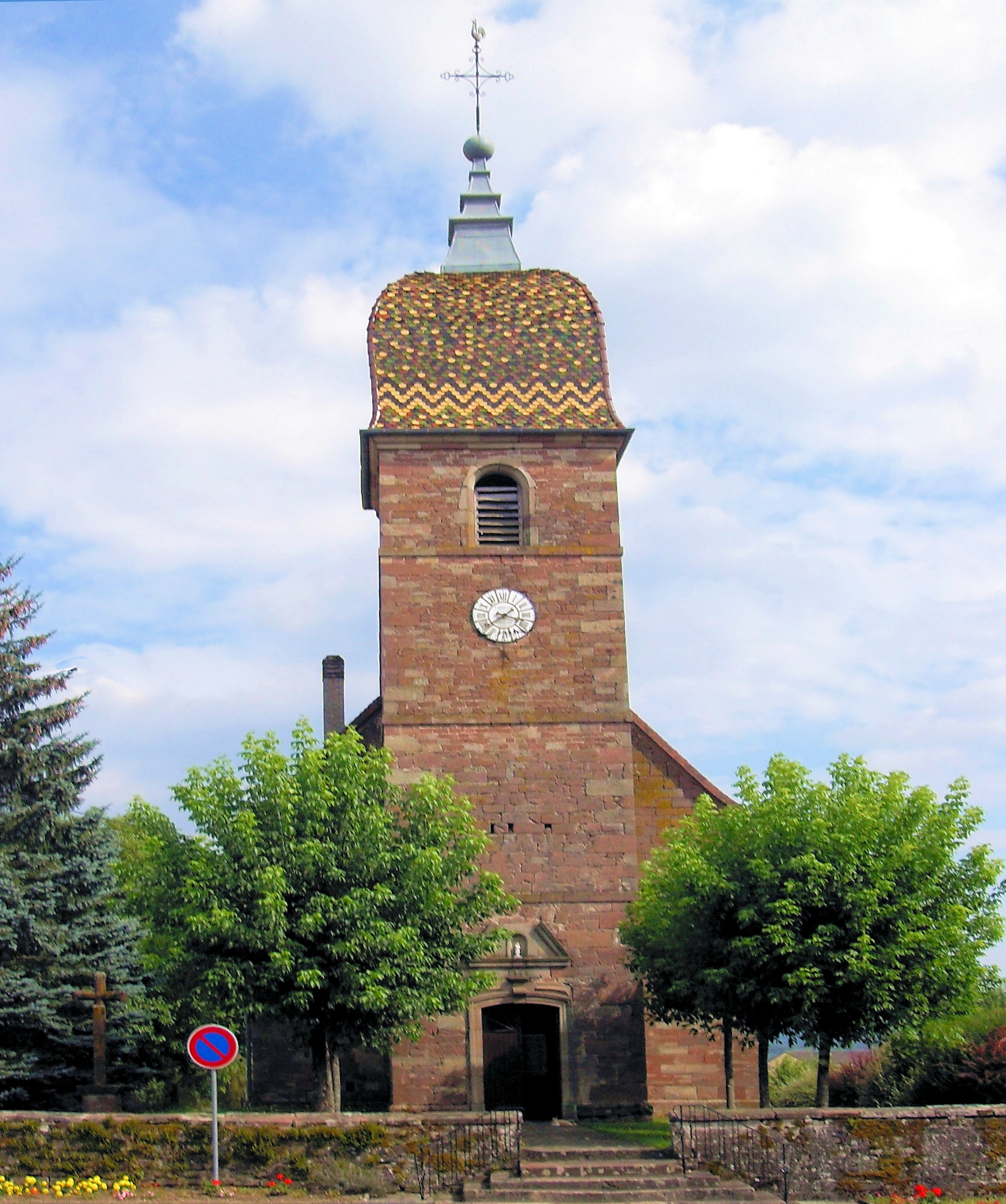 L'église Saint-Laurent à Frotey-lès-Lure